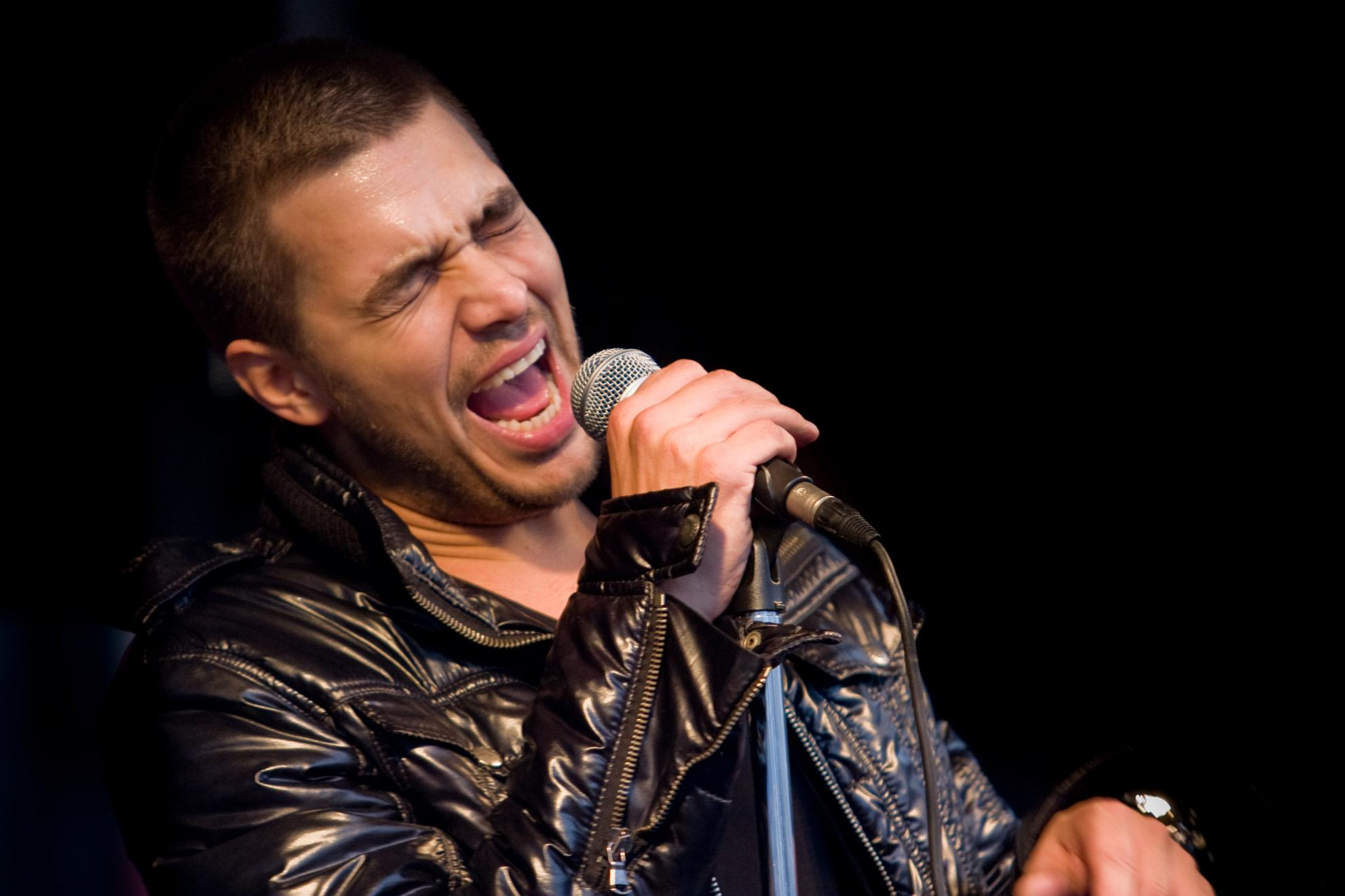 Willem Bijkerk (Apeldoorn, 20 april 1980) is een Nederlands zanger die bekend is onder de artiestennaam Waylon naar zijn idool Waylon Jennings. -- Waylon tijdens mini-benefietconcert Apeldoorn voor Haïti - Raadhuisplein Apeldoorn